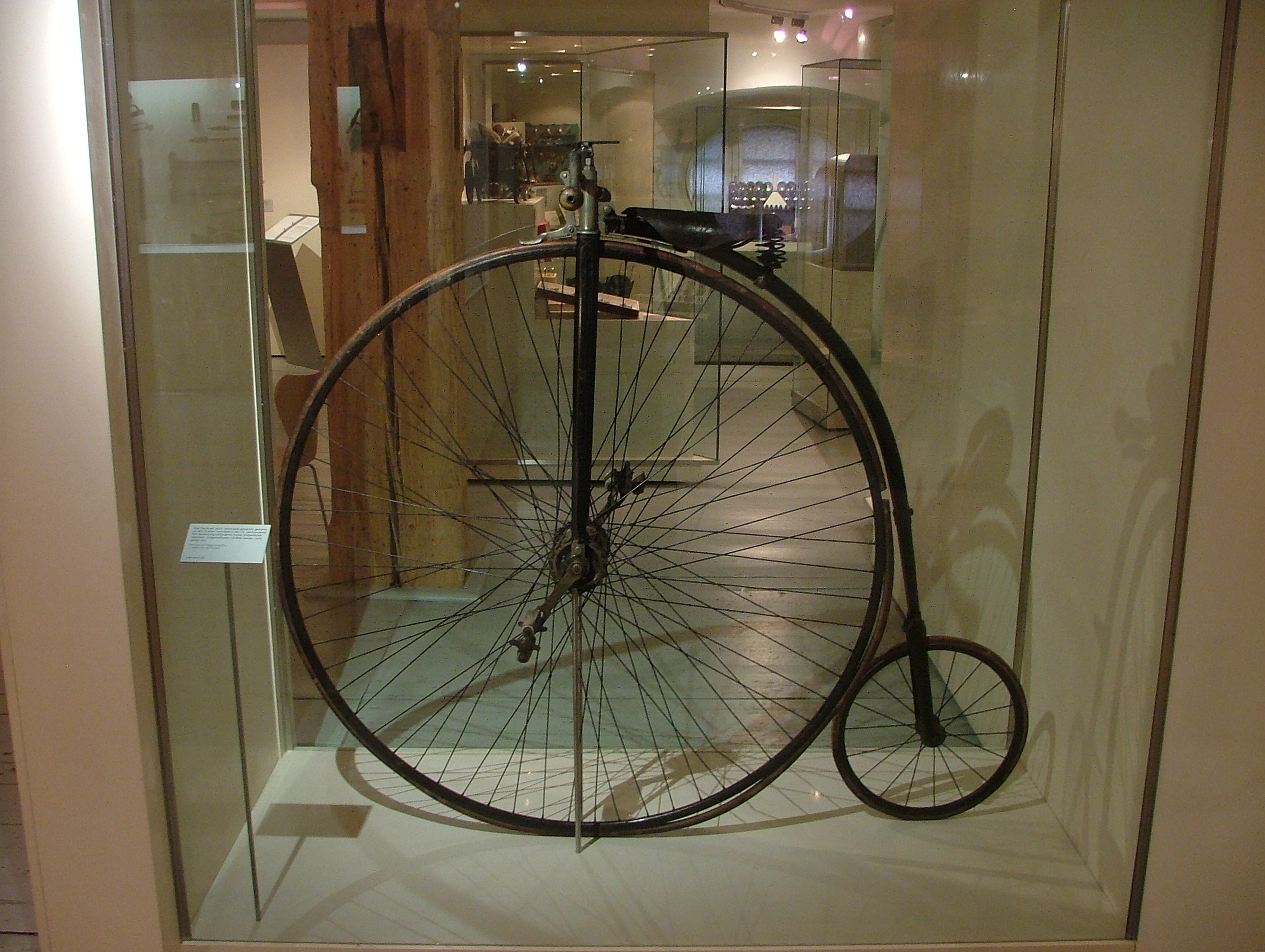 Hochrad Velociped